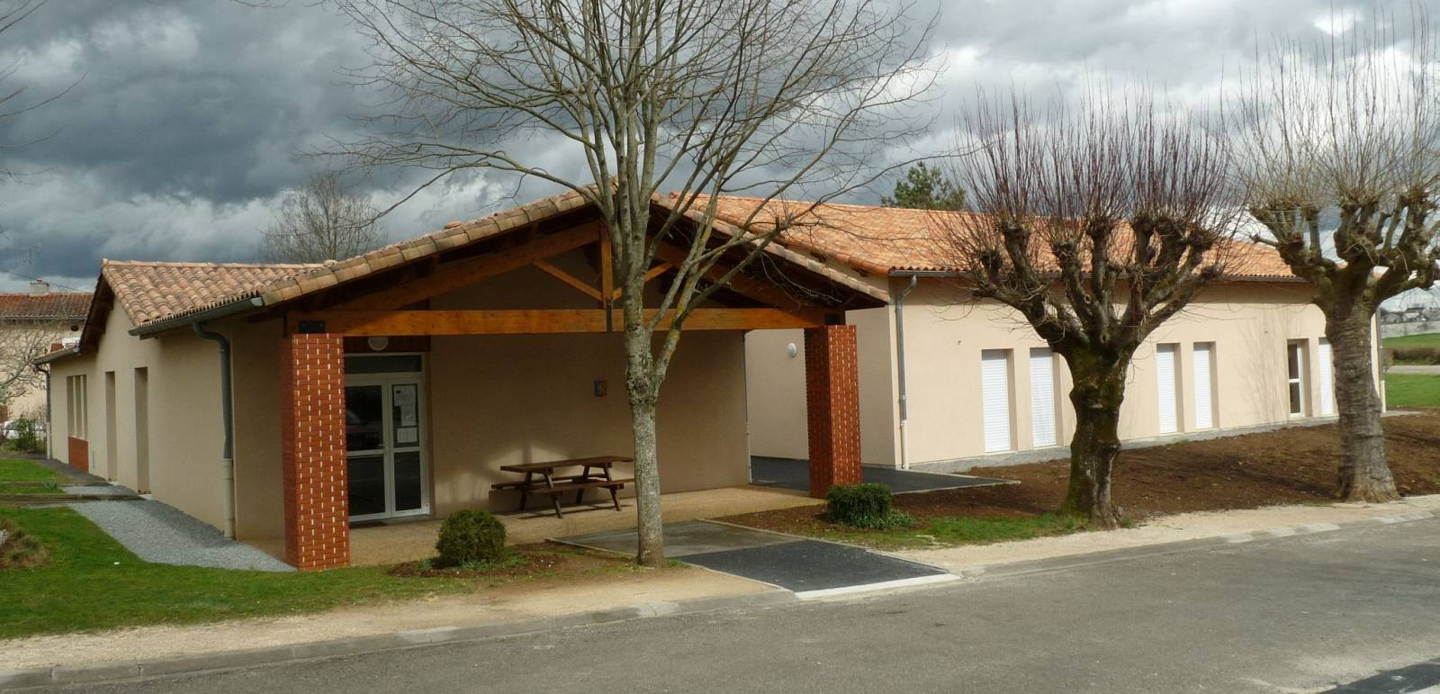 salle des fêtes de Nieuil, Charente, France